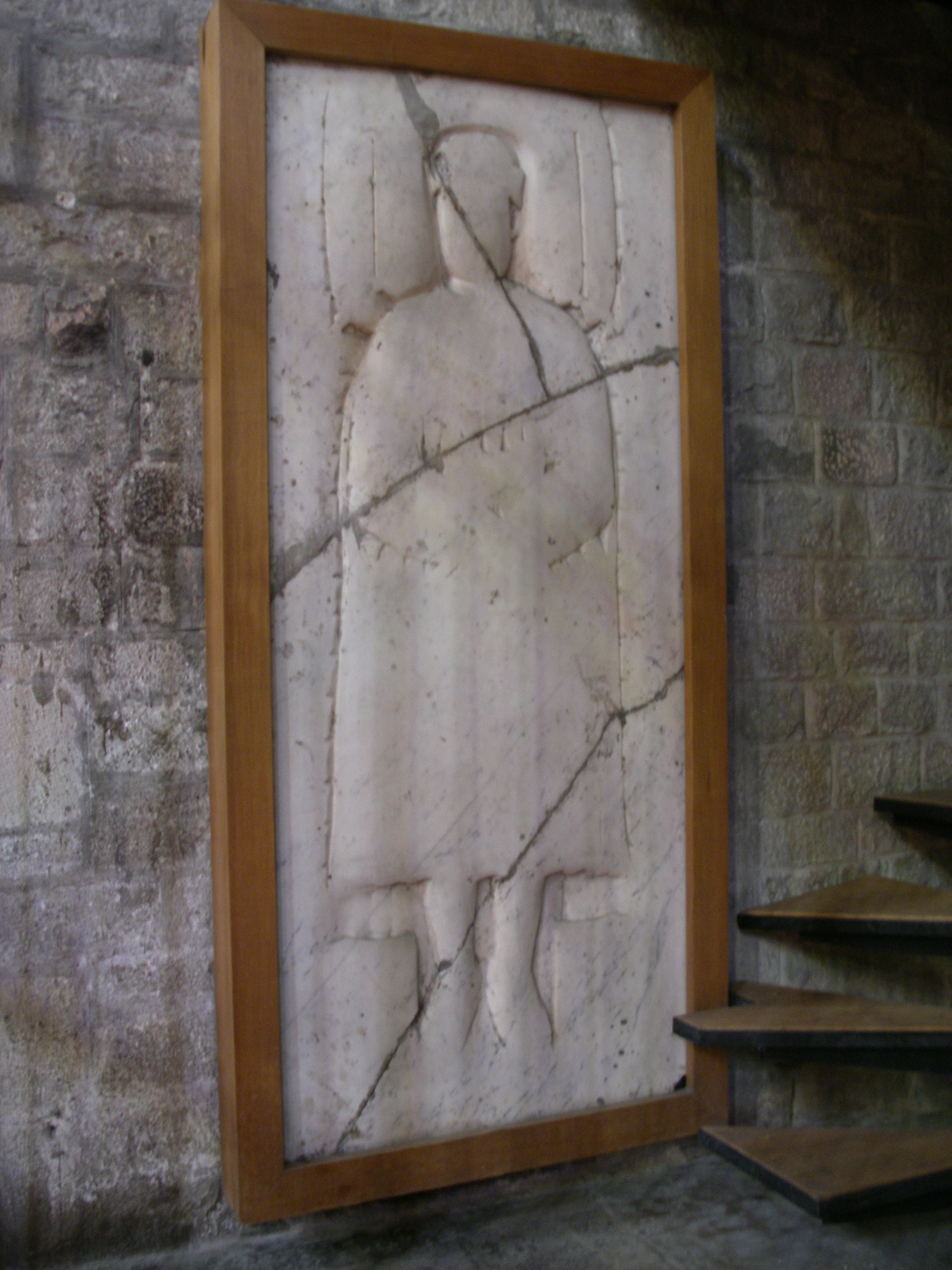 Lauda sepulcral de Pere, rei dels catalans, (1429-1466), conestable de Portugal. A una capella de Santa Maria del Mar, Barcelona. ca. 1470.